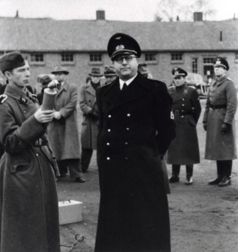 Hendrik Elias, Vlaams politicus en historicus, in uniform van het VNV, legt eerste politieke verklaring af. Plaats onbekend, 20 december 1942